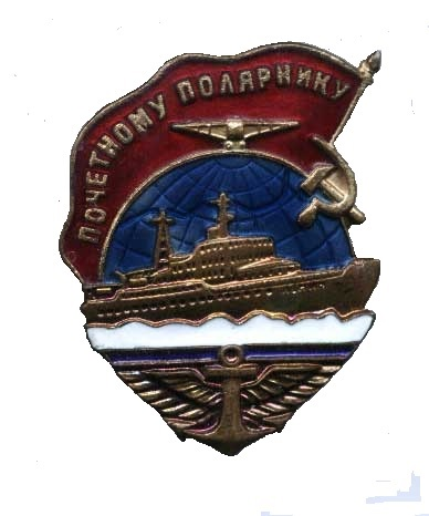 Нагрудный знак "Почетный полярник"